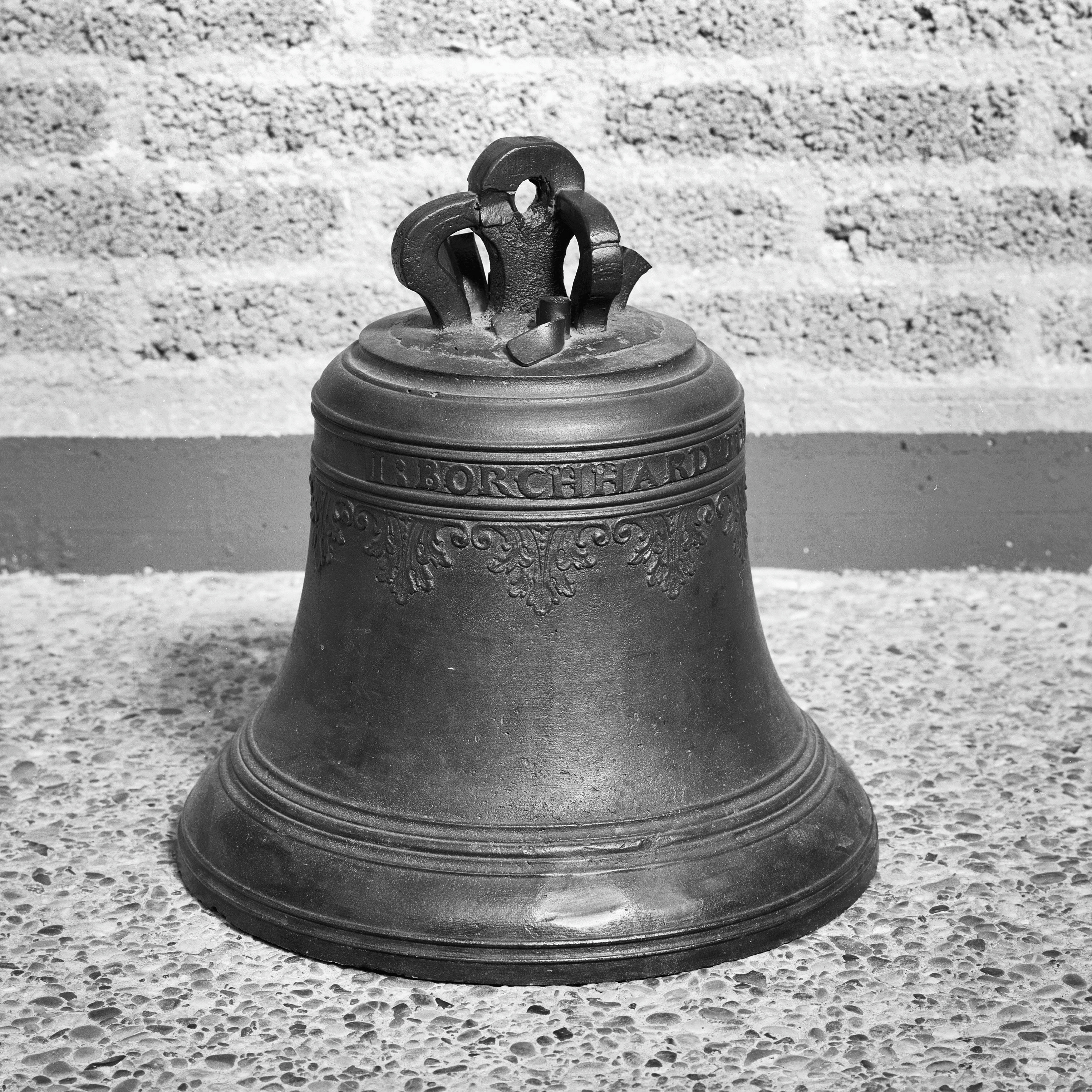 Nederlands Hervormde Kerk: klok, 1770